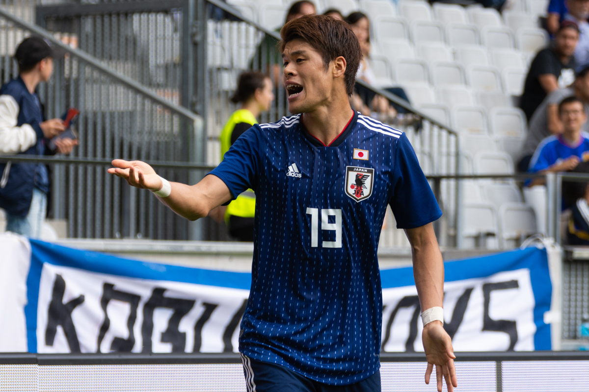 Hiroki Sakai at Japan vs Paraguay (June 2018)